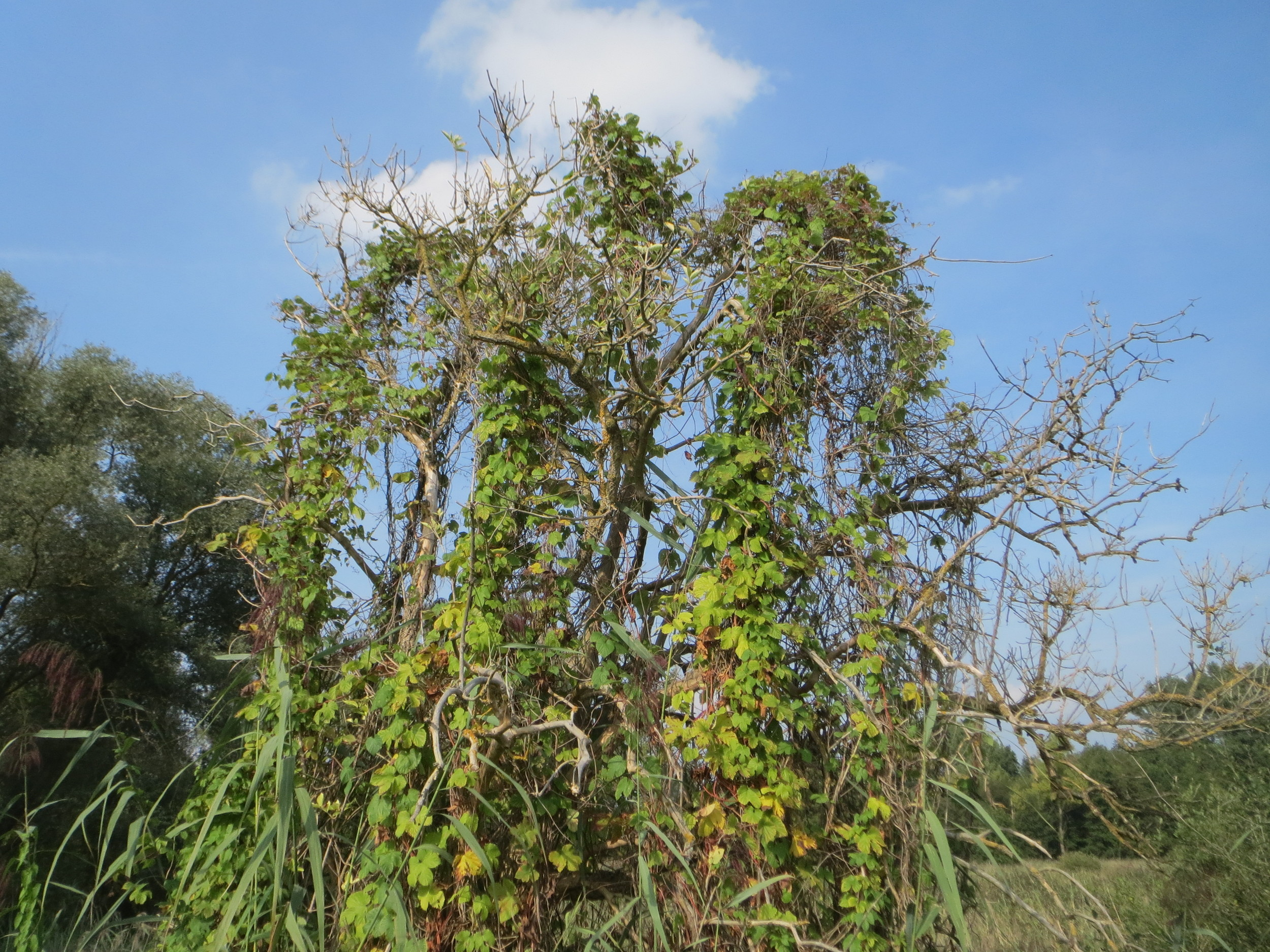 Wilder Hopfen (Humulus lupulus) im Naturschutzgebiet Wagbachniederung